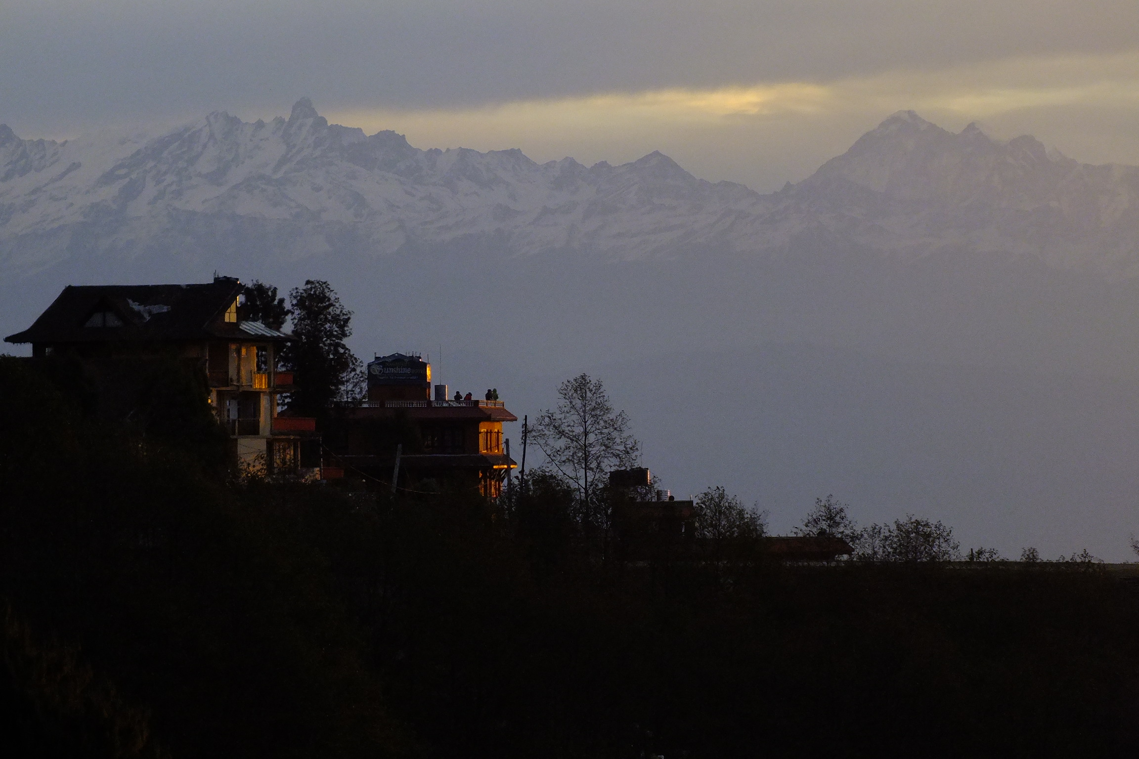 2015-03-18 Nagarkot at sunrise